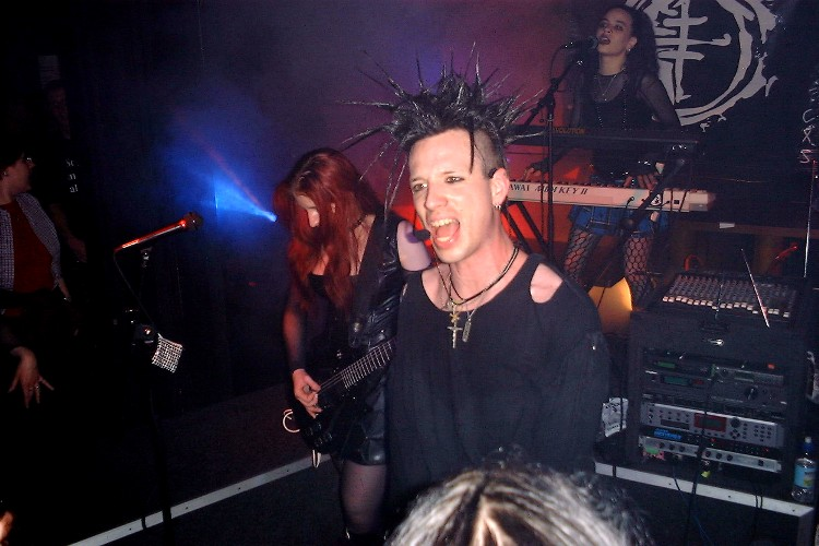 selbst fotografiert